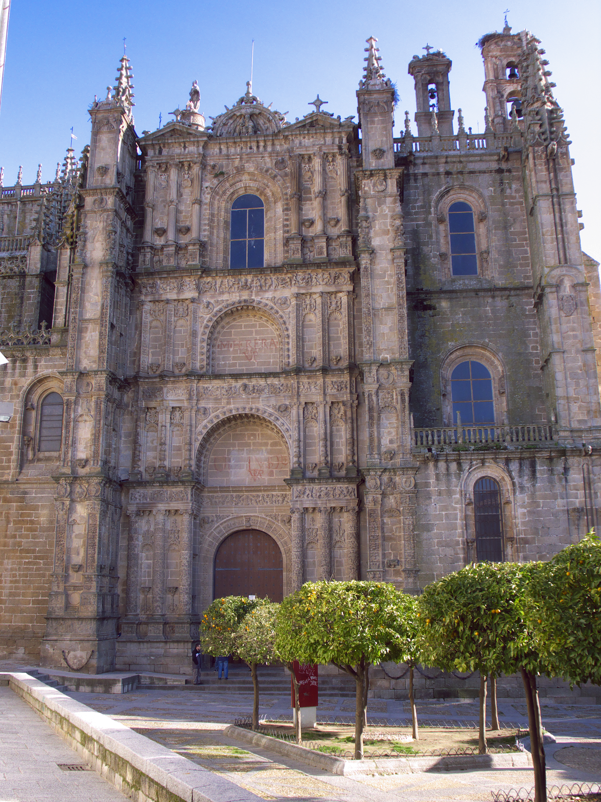 Portada septentrional de la Catedral Nueva o de Nuestra Señora de la Asunción, Plasencia. Puerta de las Cadenas (1522-1556), obra del Maestro Mayor, Juan de Álava, principalmente, terminada por Rodrigo Gil de Hontañón